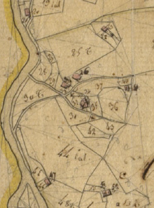 El Terra Roig (la Menera) en el Cadastre napoleònic del 1812 (Arxius Departamentals dels Pirineus Orientals)